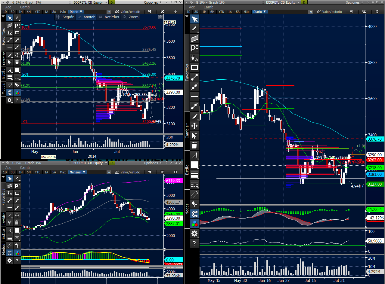 Analisis tecnico de ecopetrol